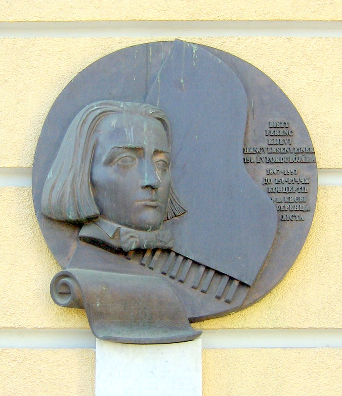 Меморіальна дошка на будинку де виступав Ліст